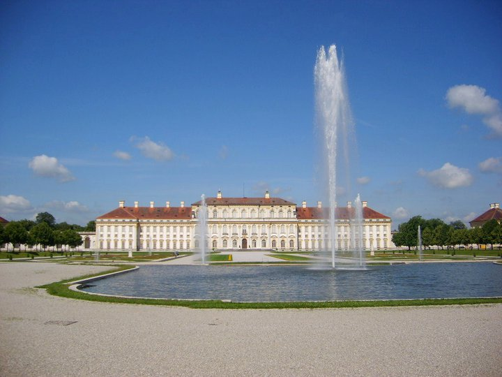 Hauptgebäude mit Brunnen, und klassischen AlleeThis is a photograph of an architectural monument.